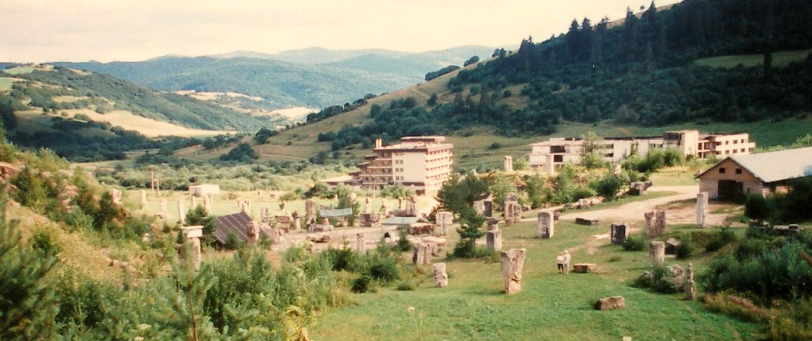 Sochy v prírode vo Vyšných Ružbachoch rok 2001, okr.Stará Ľubovňa,región Spiš.